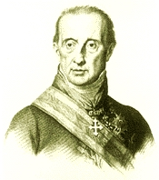 Vittorio Fossombroni. Immagine Tratta da qui.